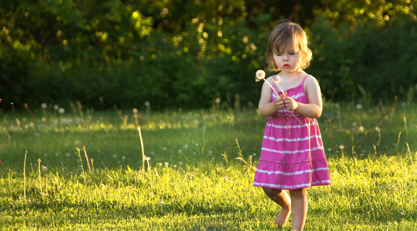 Malaika